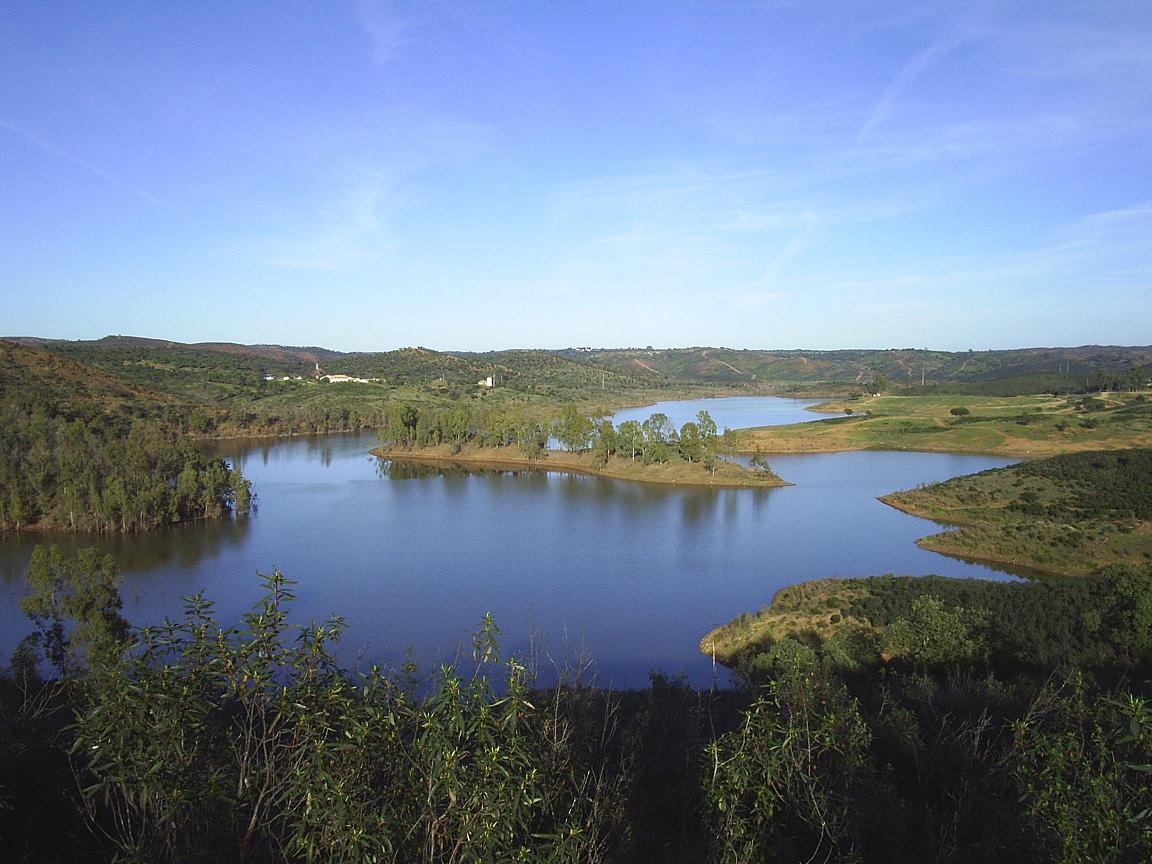 PANTANO DE AZNALCOLLAR. SEVILLA